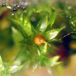 Capsules (sporophyte) de la mousse Physcomitrella patens